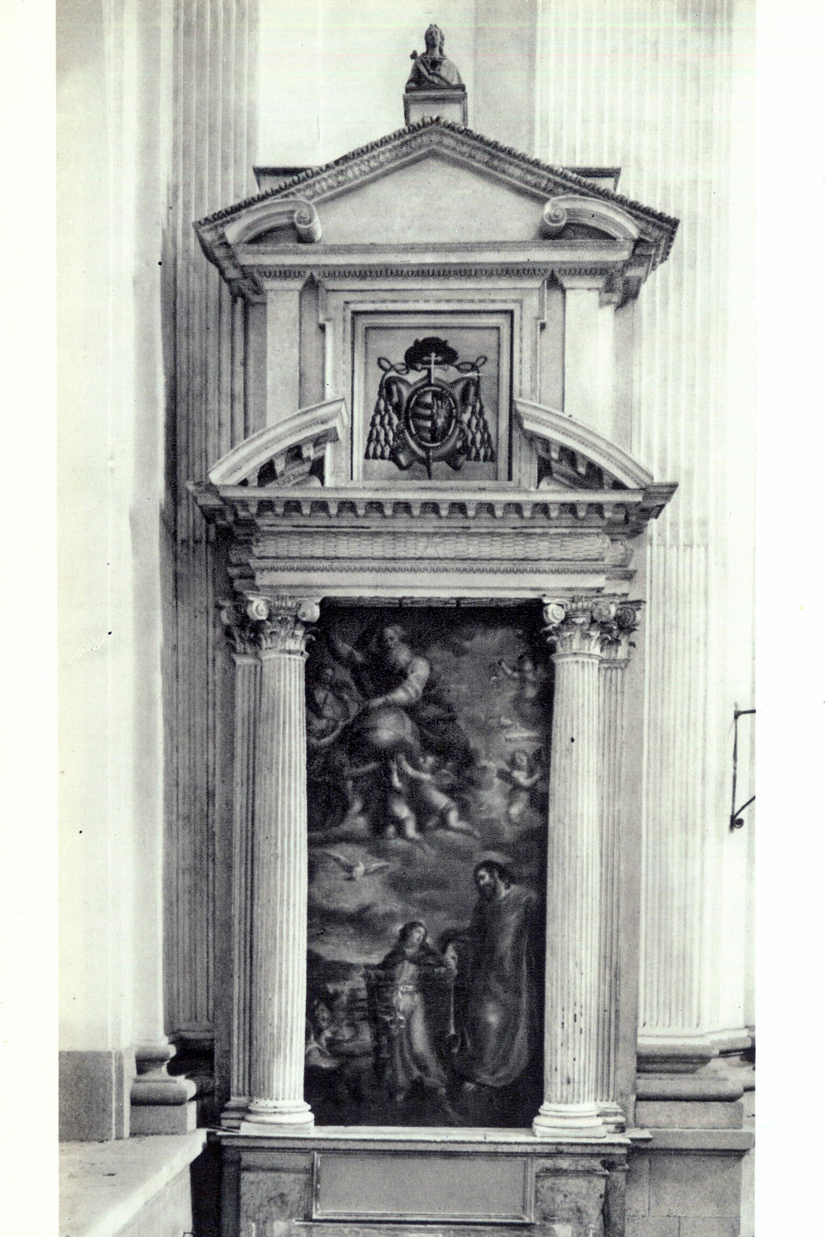 Es obra de Jorge Manuel Teotokópoulos, según diseño de su padre, El Greco.